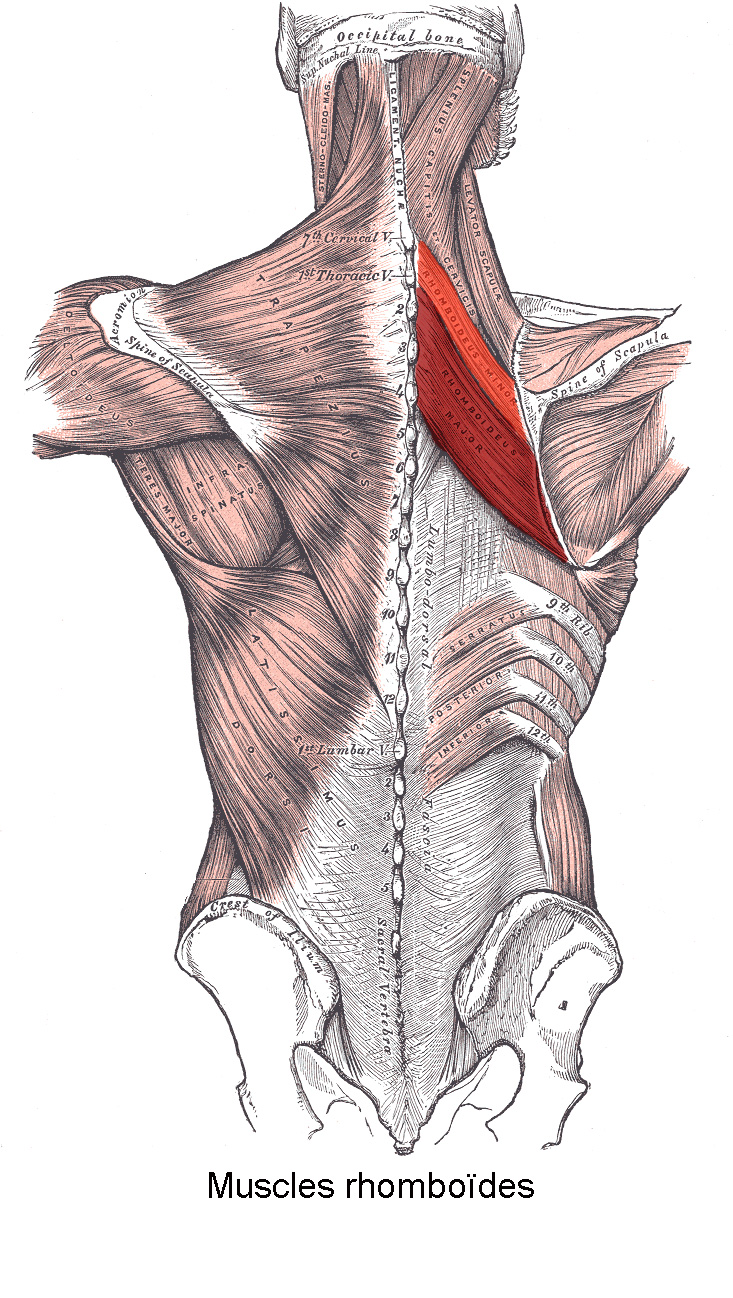 Rhomboideus minor muscle